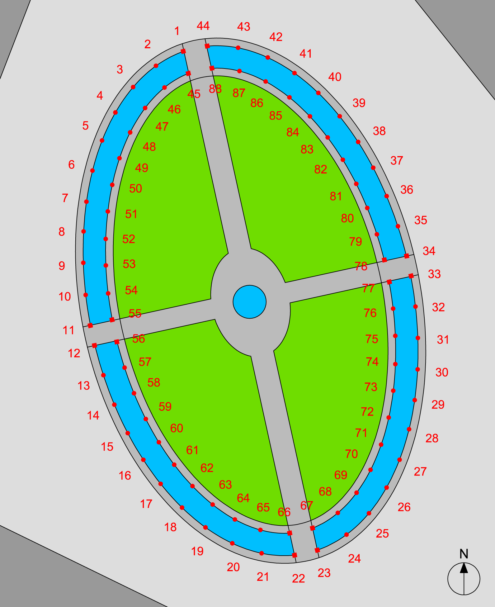 Pianta statue Prato della Valle (Padova)